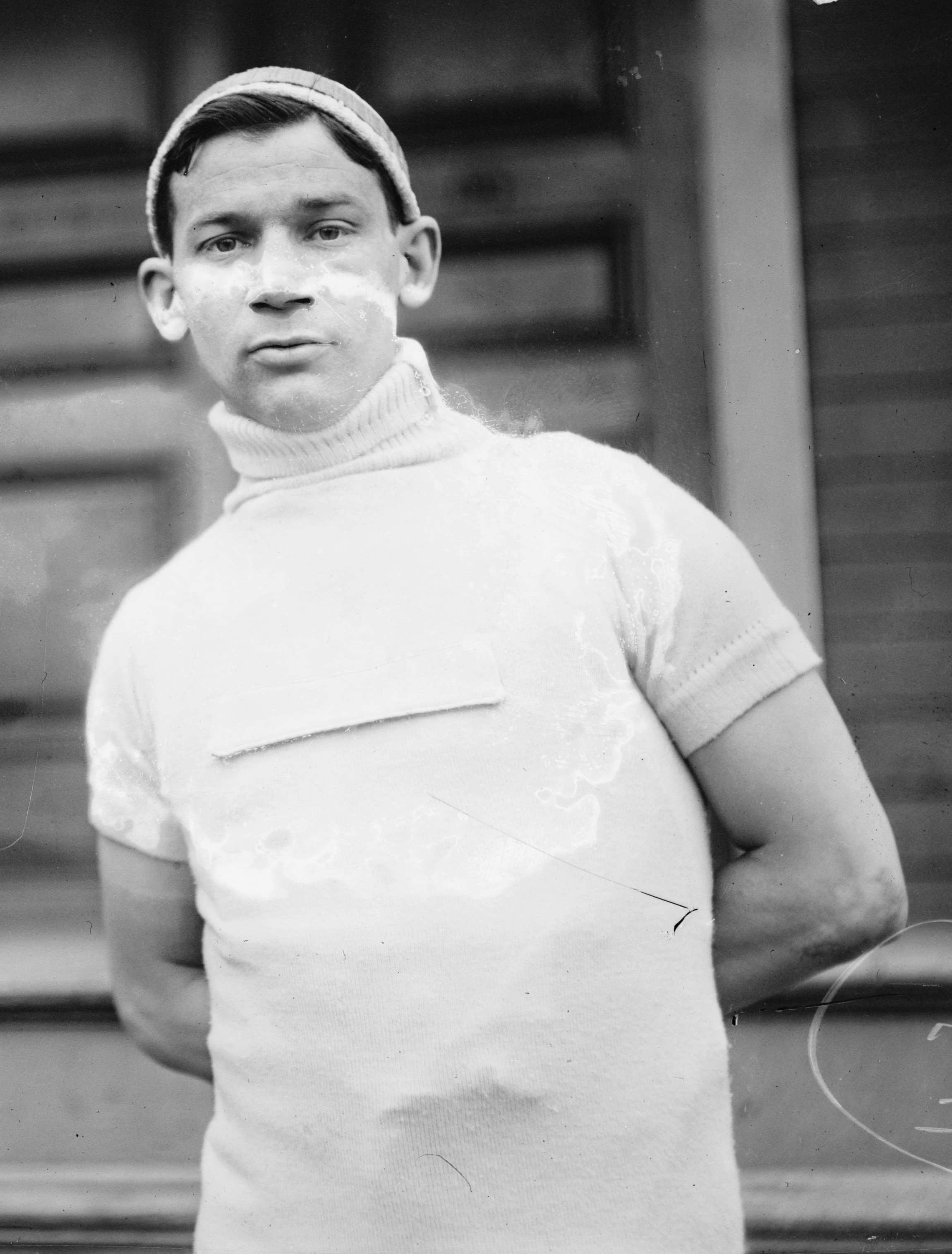 Maurice Brocco, 7/11/12